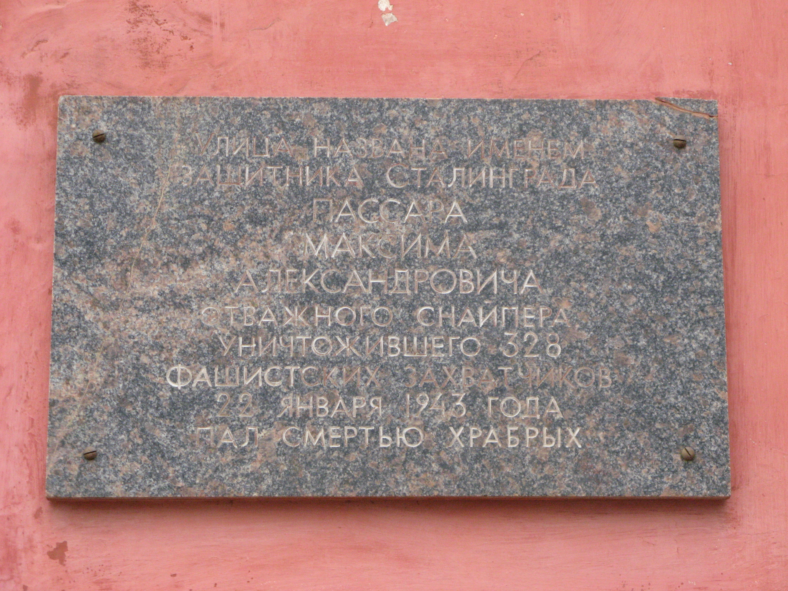 Мемориальная доска на улице Пассара в Волгограде, названной в честь Пассара Максима Александровича